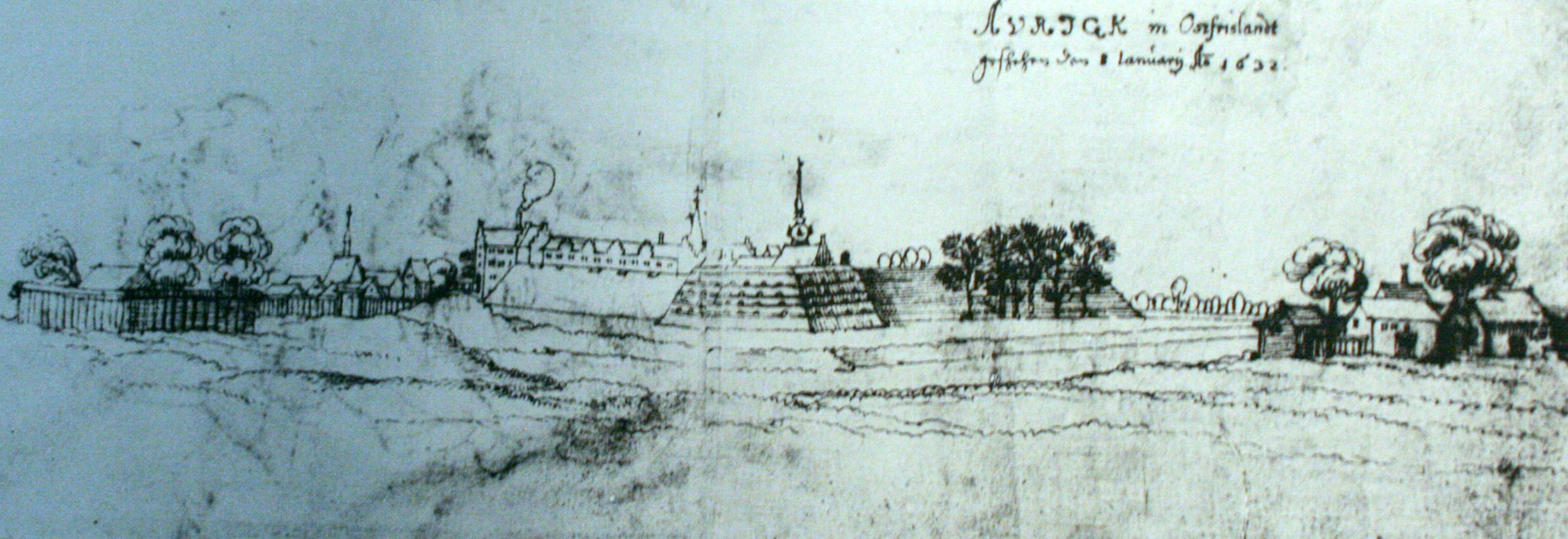 Aurich, Hand Drawing, 1632